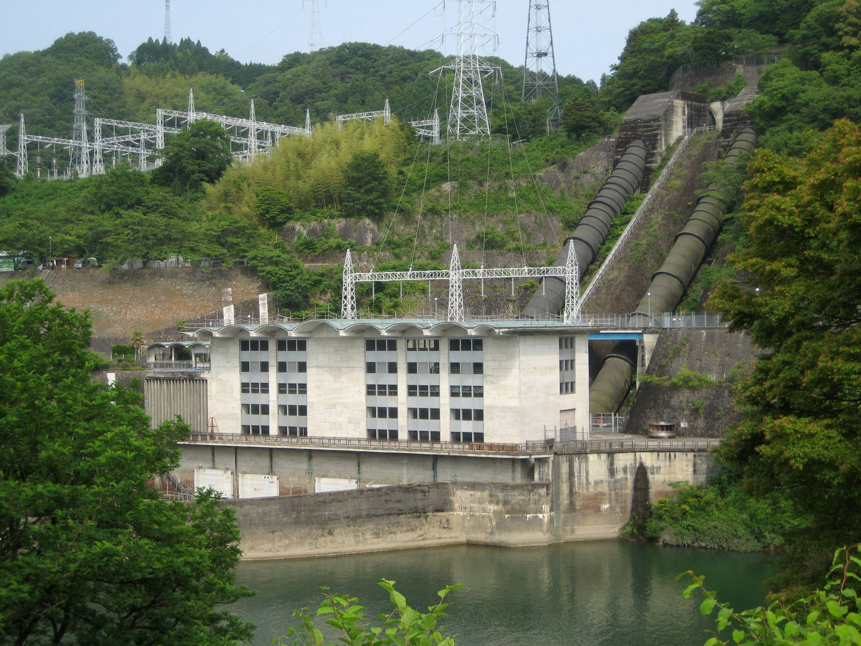 Maruyama Dam (丸山ダム)